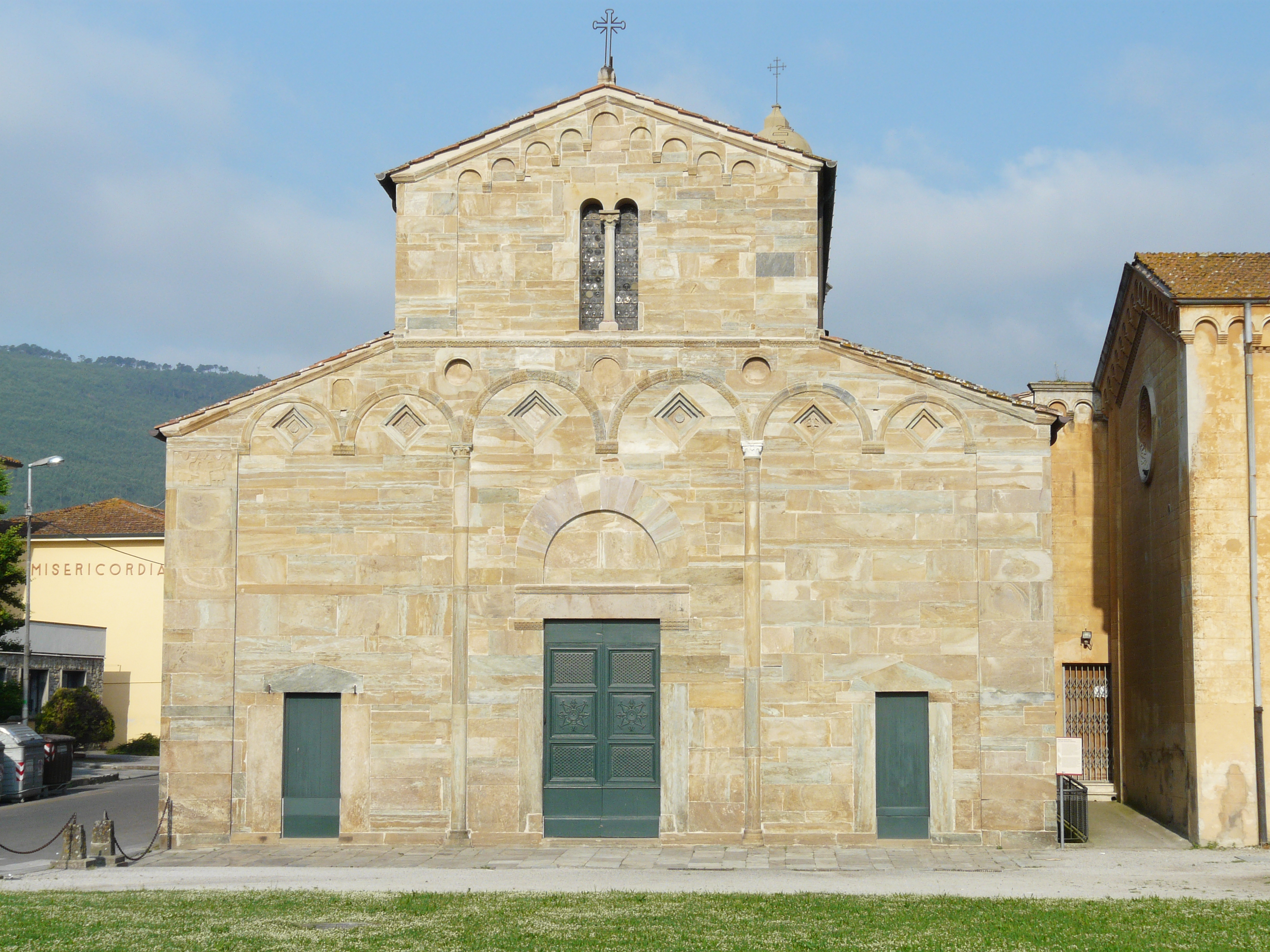 Pieve di Santa Maria Assunta, Comune di Vicopisano, Toscana, Italia